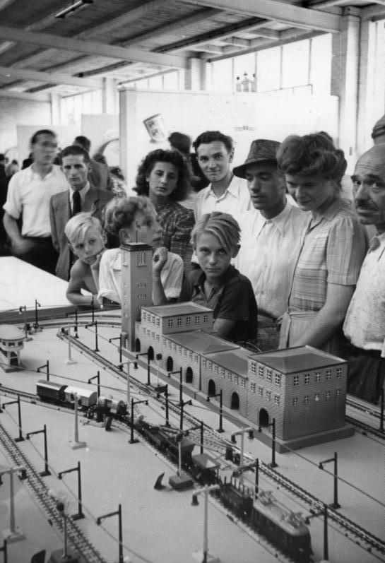 Hannover Messe, Messestand "Märklin" Export-Messe in Hannover 1947 U.B.z.: Stand der Firma "Märklin", deren Spielzeugschau ein grosser Anziehungspunkt bedeutete, allerdings für "deutsche Besucher" nicht erwerblich. Illus-ADN 792-47 [Hannover, Messe.- Modellbahn auf dem Messestand der Firma "Märklin"]